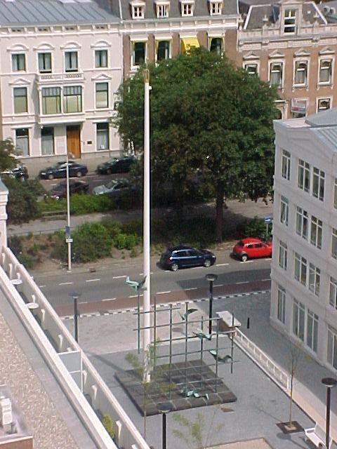 Irene Monument Den Haag by Aart van den IJssel